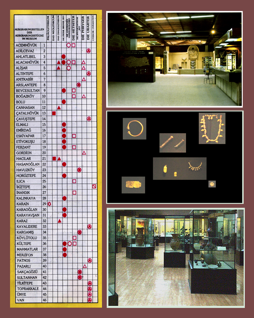 Régészeti helyszínek és kiállítási terek (Anatóliai Civilizációk Múzeuma, Ankara, Törökország)